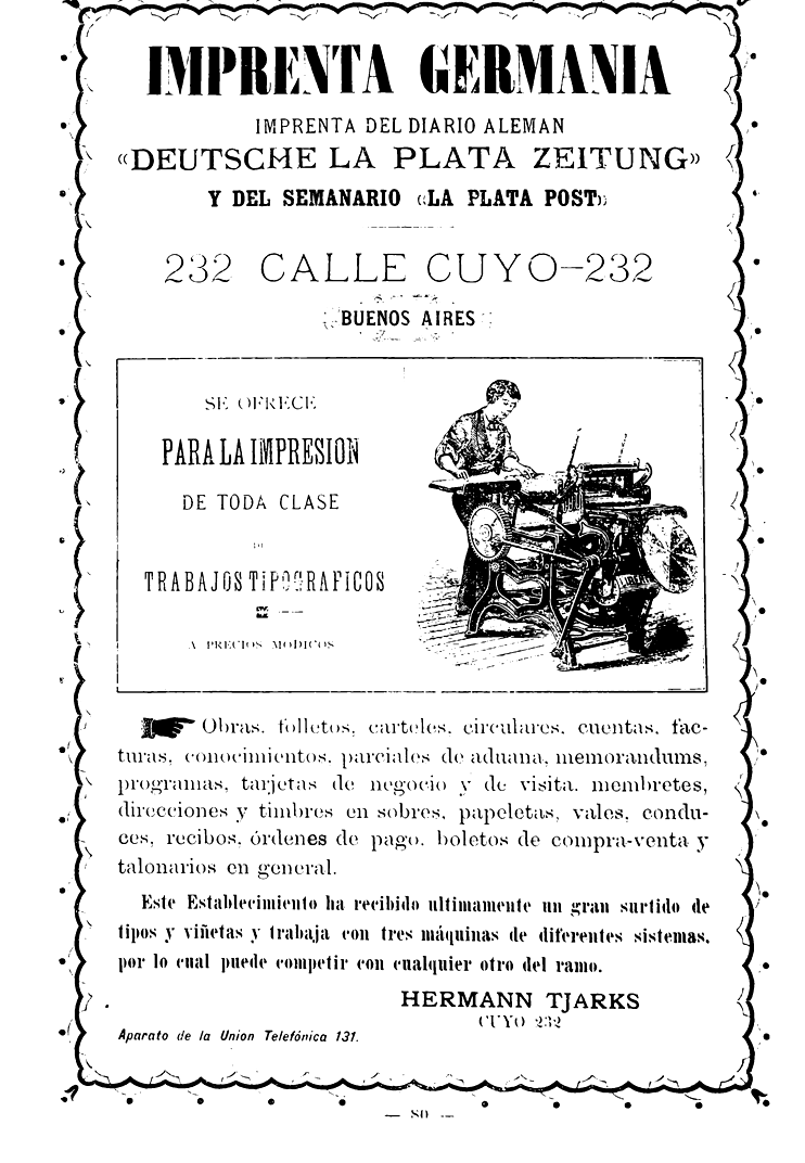 Imprenta Germania de Hermann O. Tjarks